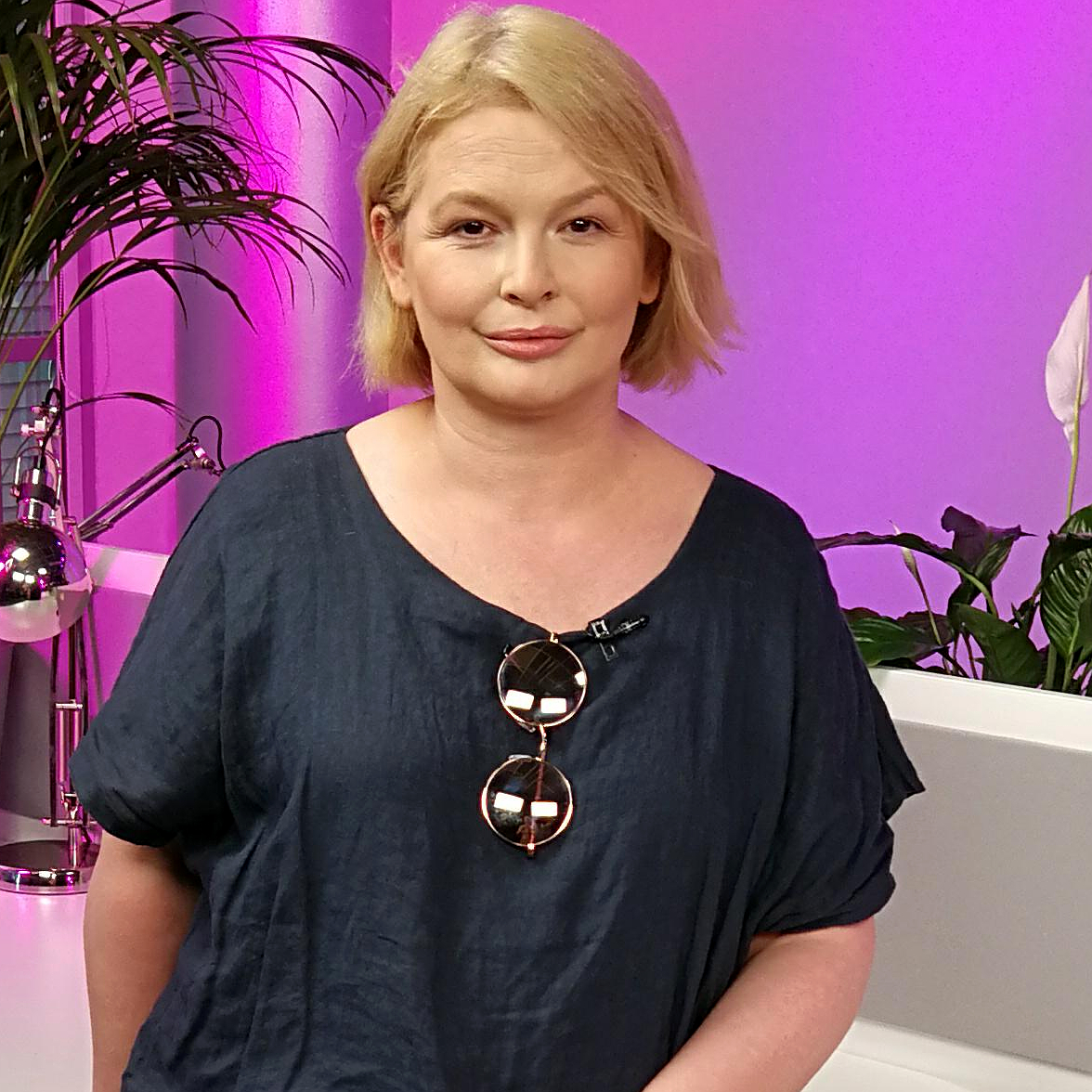 Polska aktorka Dominika Ostałowska w 2018 roku.